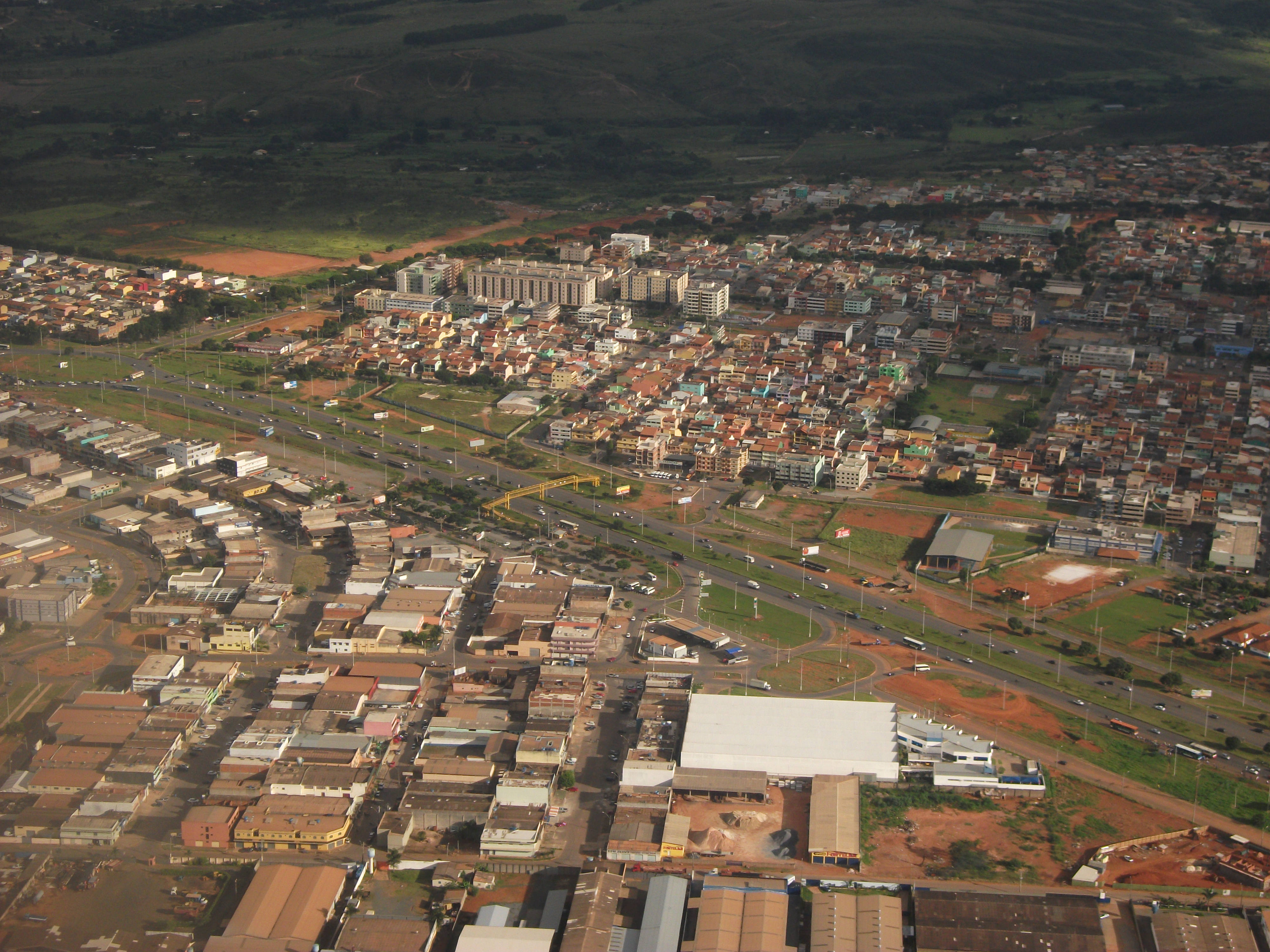 Vista parcial de Riacho Fundo - DF.